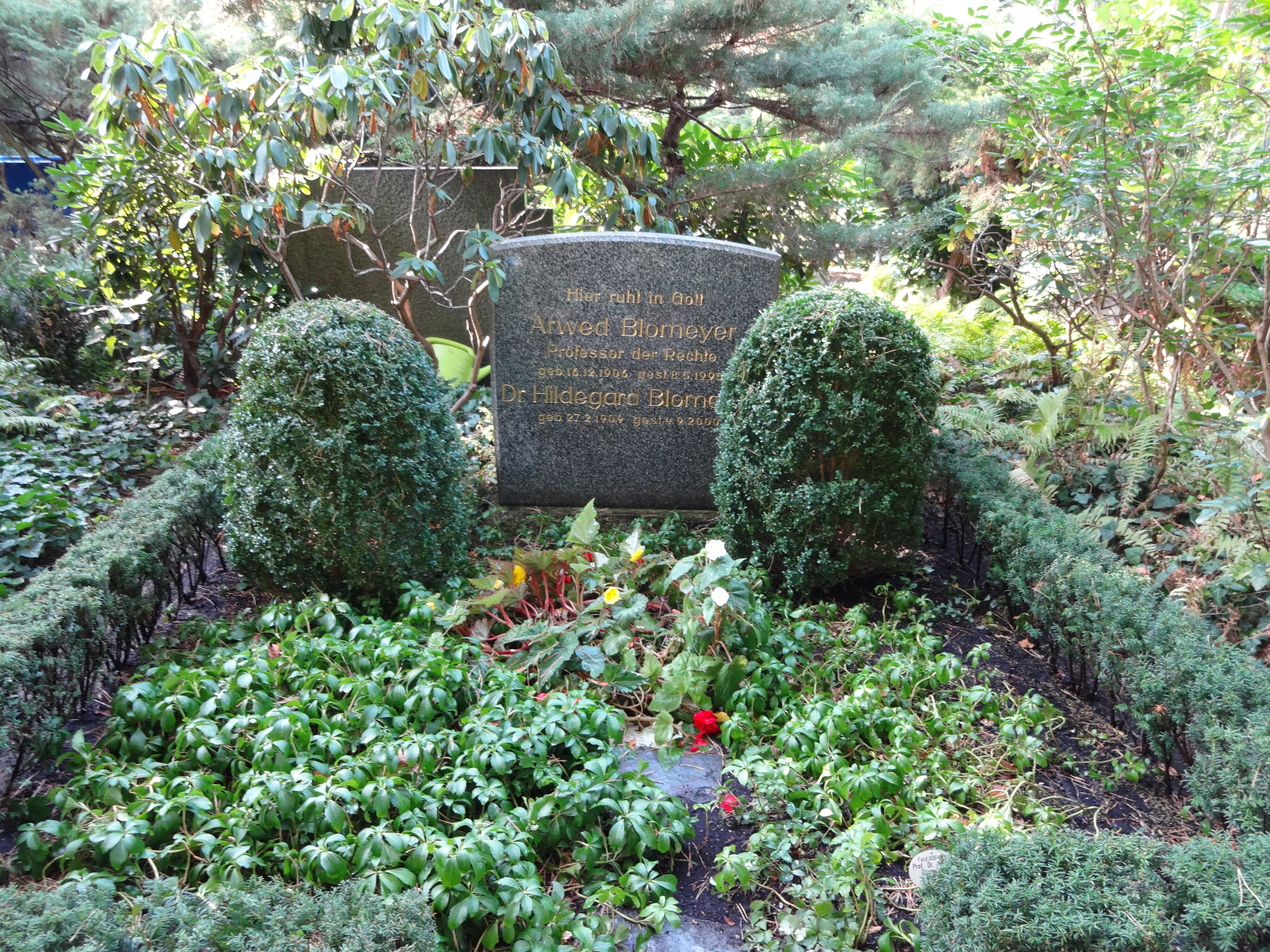 Grab von Prof. Arwed Blomeyer auf dem Waldfriedhof Dahlem in Berlin